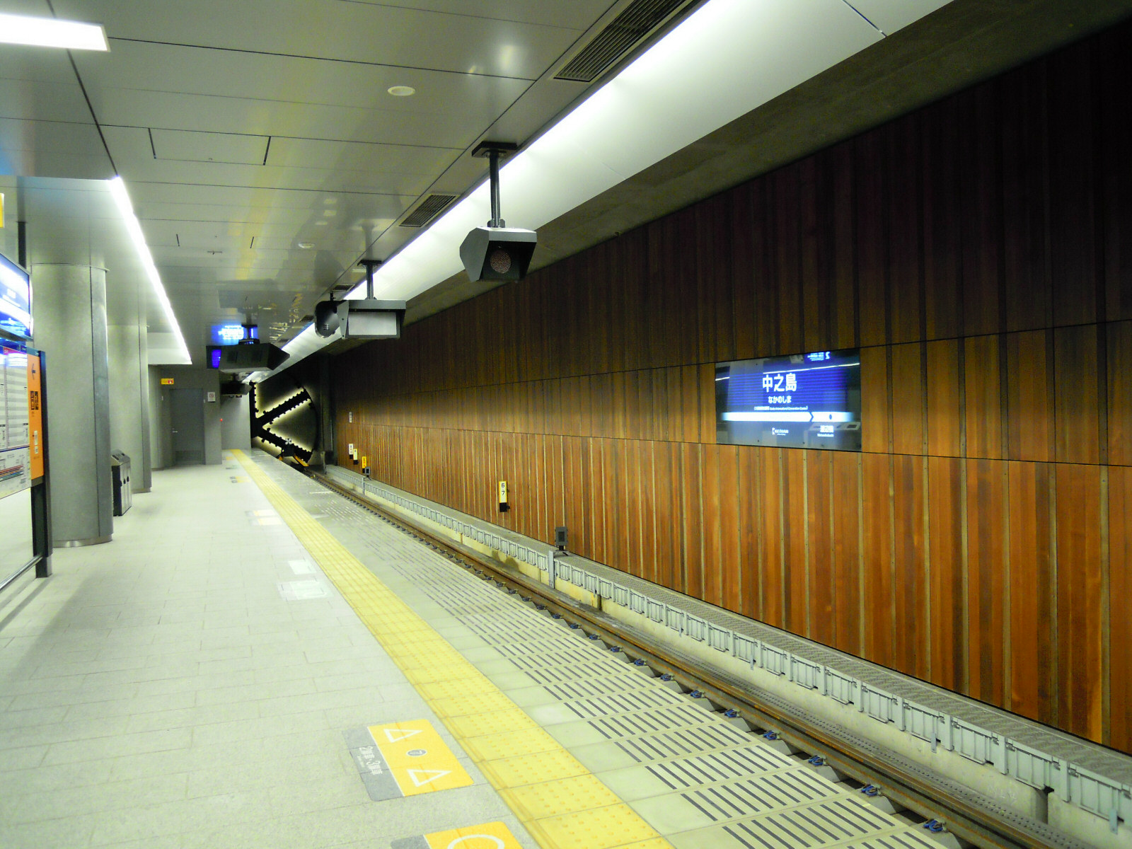 Keihan Nakanoshima station platform